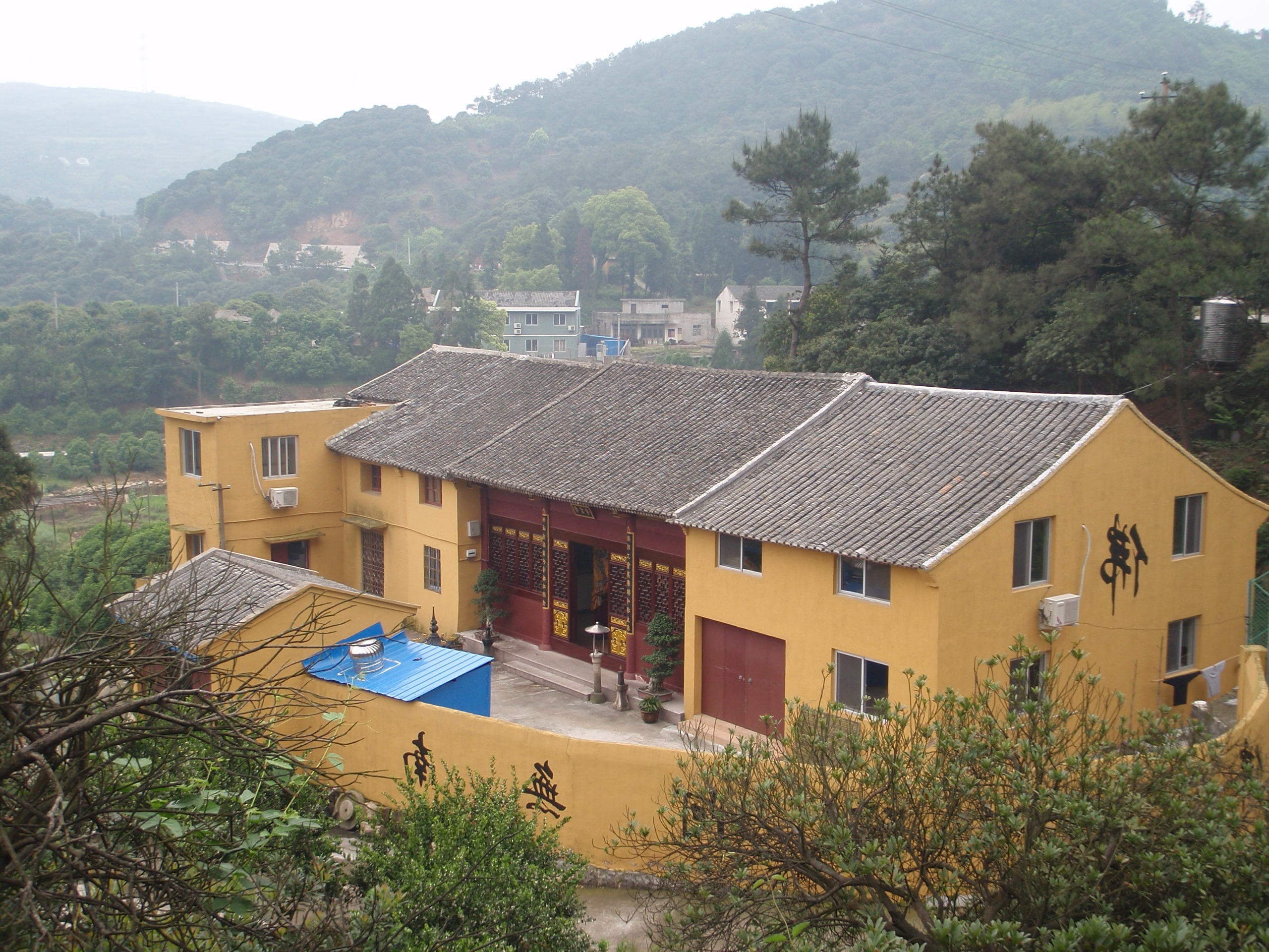 香雪寺 Xiāngxuě sì.